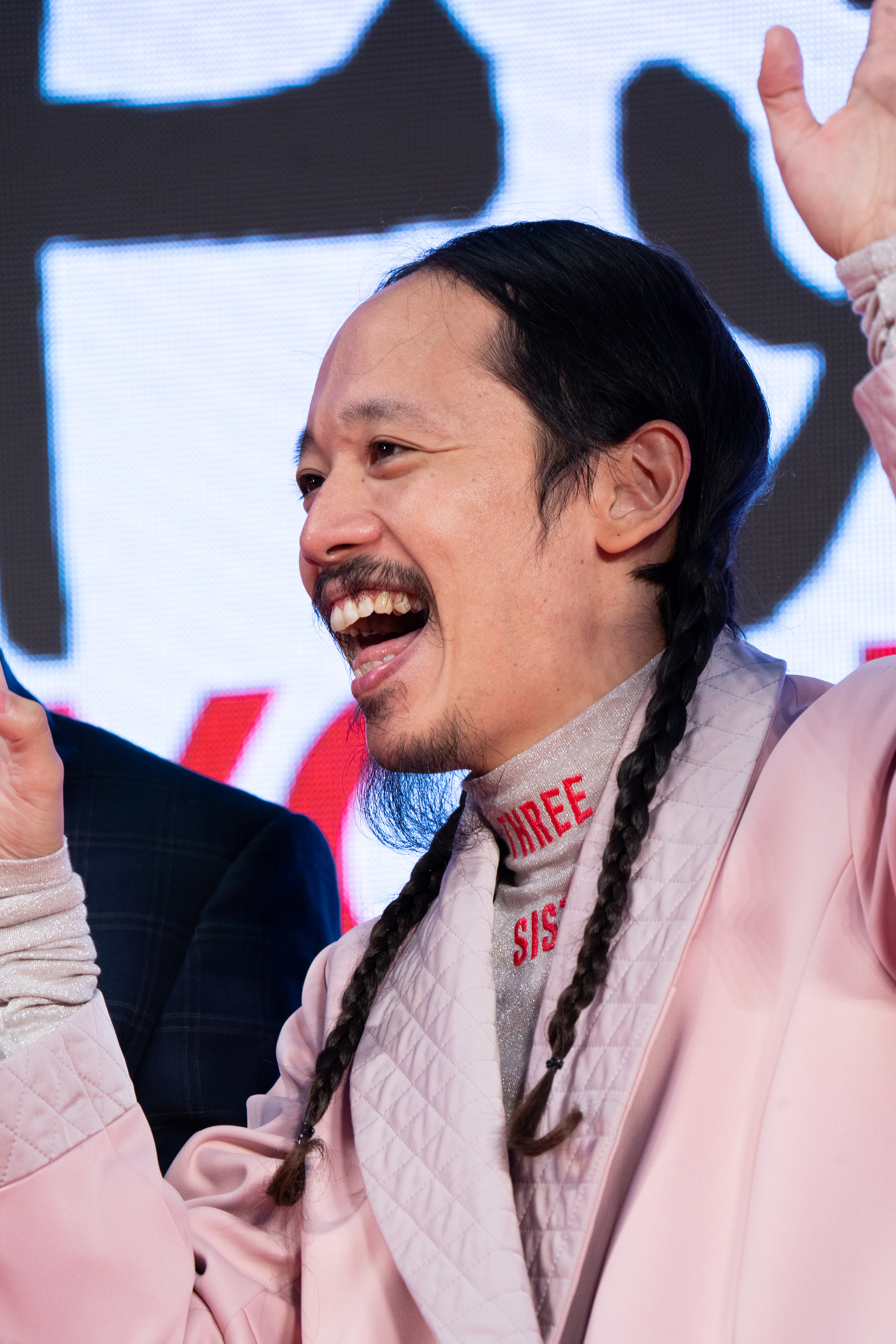 第32回 東京国際映画祭 オープニングセレモニー 長久允 (WE ARE LITTLE ZOMBIES)